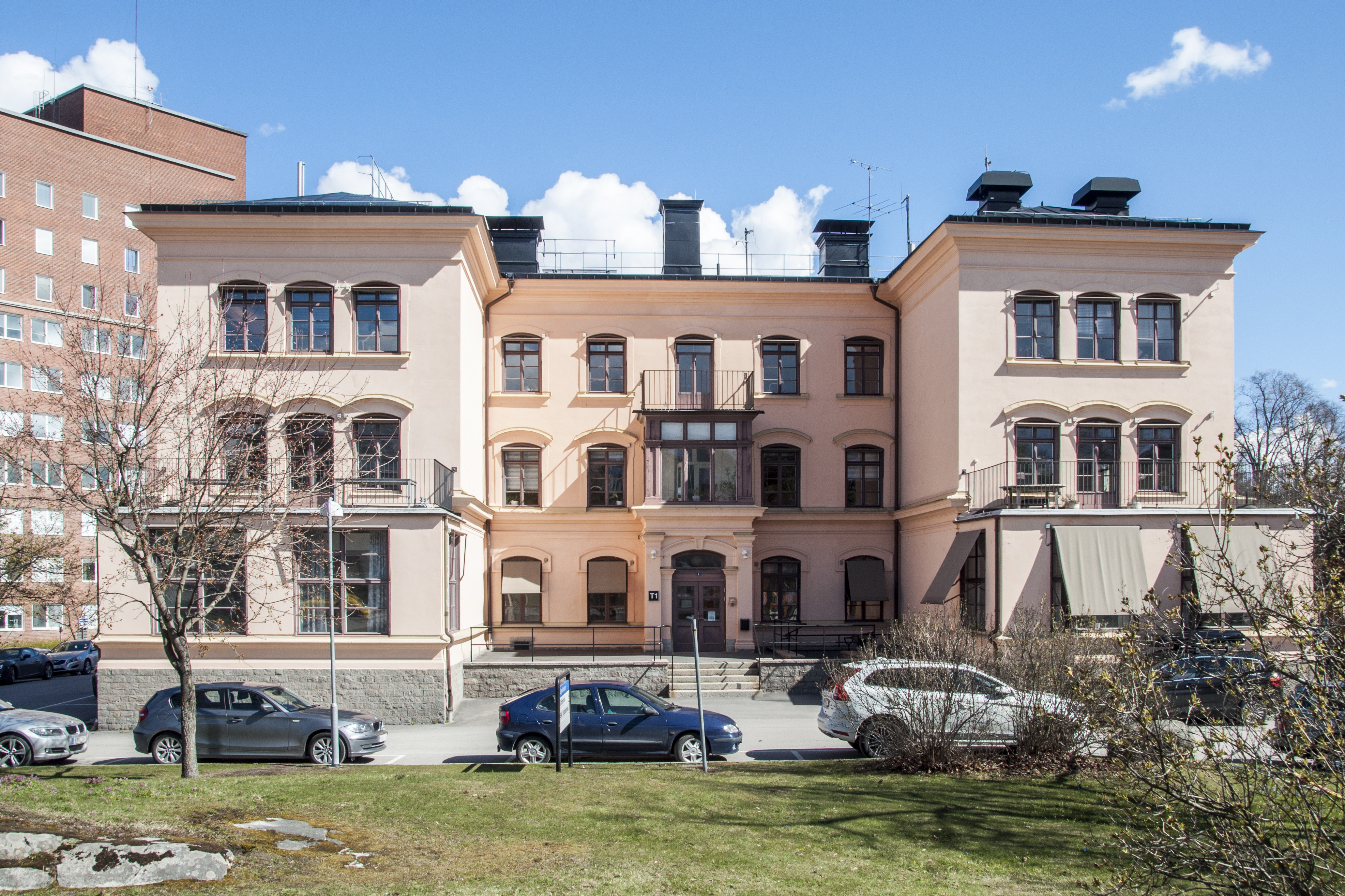 Karolinska Solna, Eugeniahemmet. Byggnadsår 1886, arkitekt Axel Kumlien